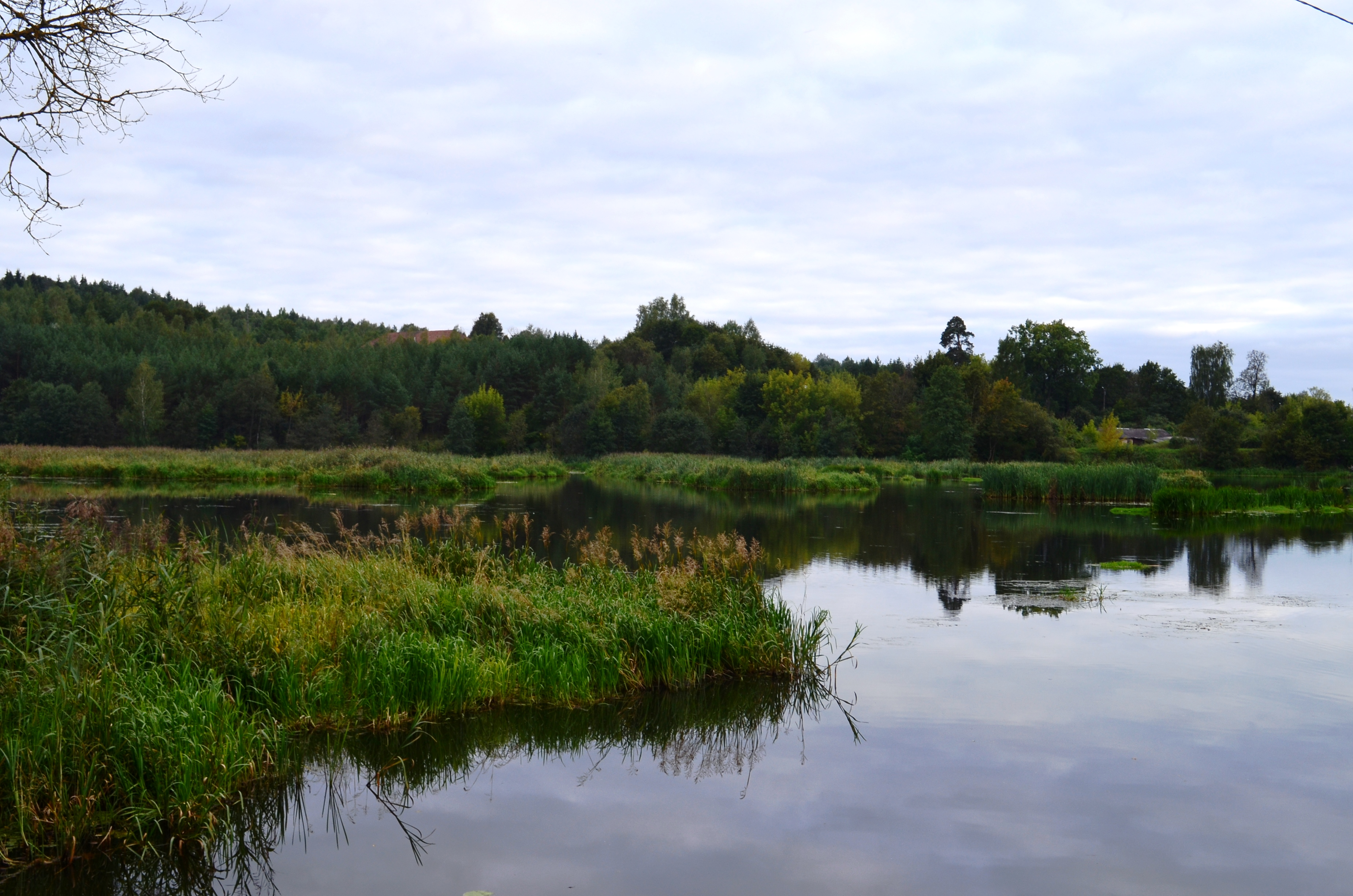 Rokantiškių tvenkinys, N. Vilnios sen., Vilnius